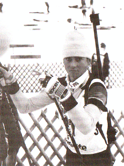 Гордостта на жителите на Брани поле е Надежда Алексиева, която прослави родното си село в страната и по света.